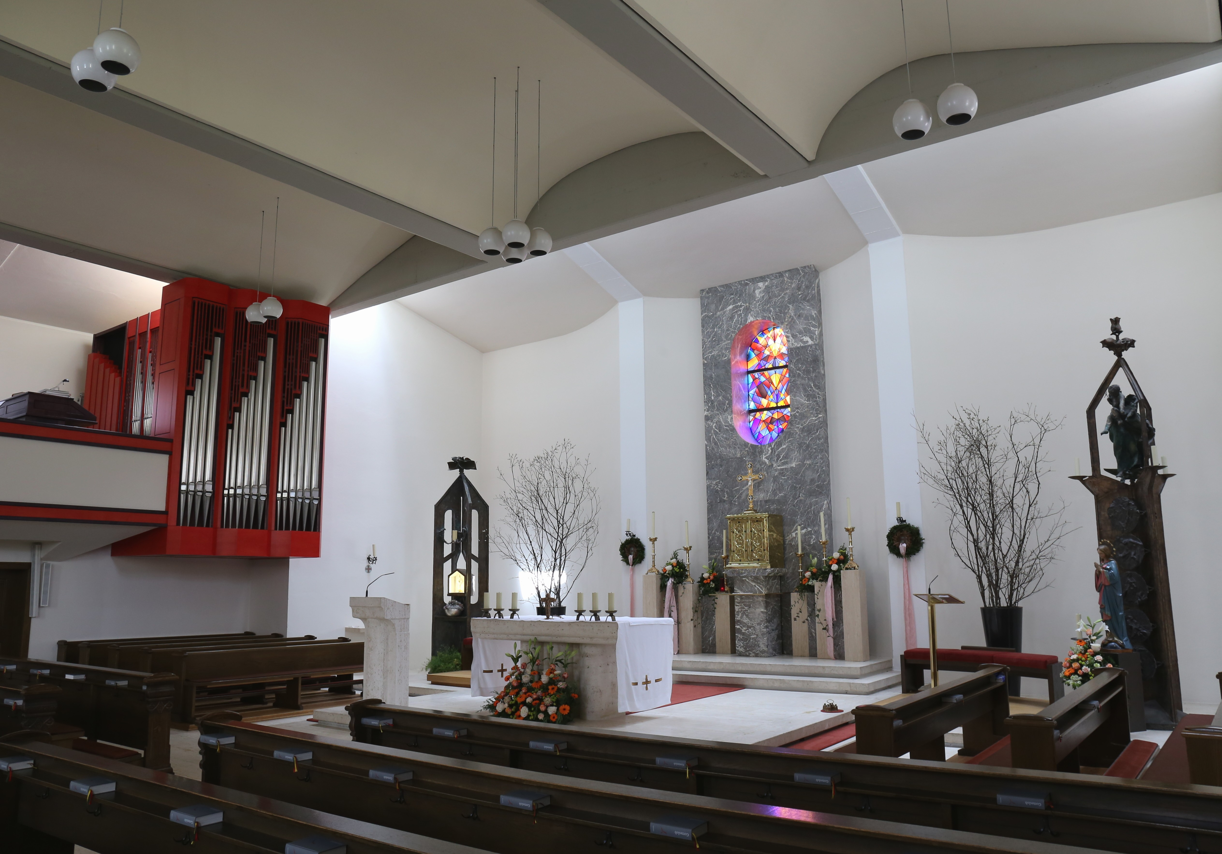 Dorf, Schwoich; Kath. Pfarrkirche hl. Ägidius, 1690 als barocker Neubau errichtet, 1975 erweitert This media shows the remarkable cultural object in the Austrian state of Tyrol listed by the Tyrolean Art Cadastre with the ID 2772. (on tirisMaps, pdf, more images on Commons)